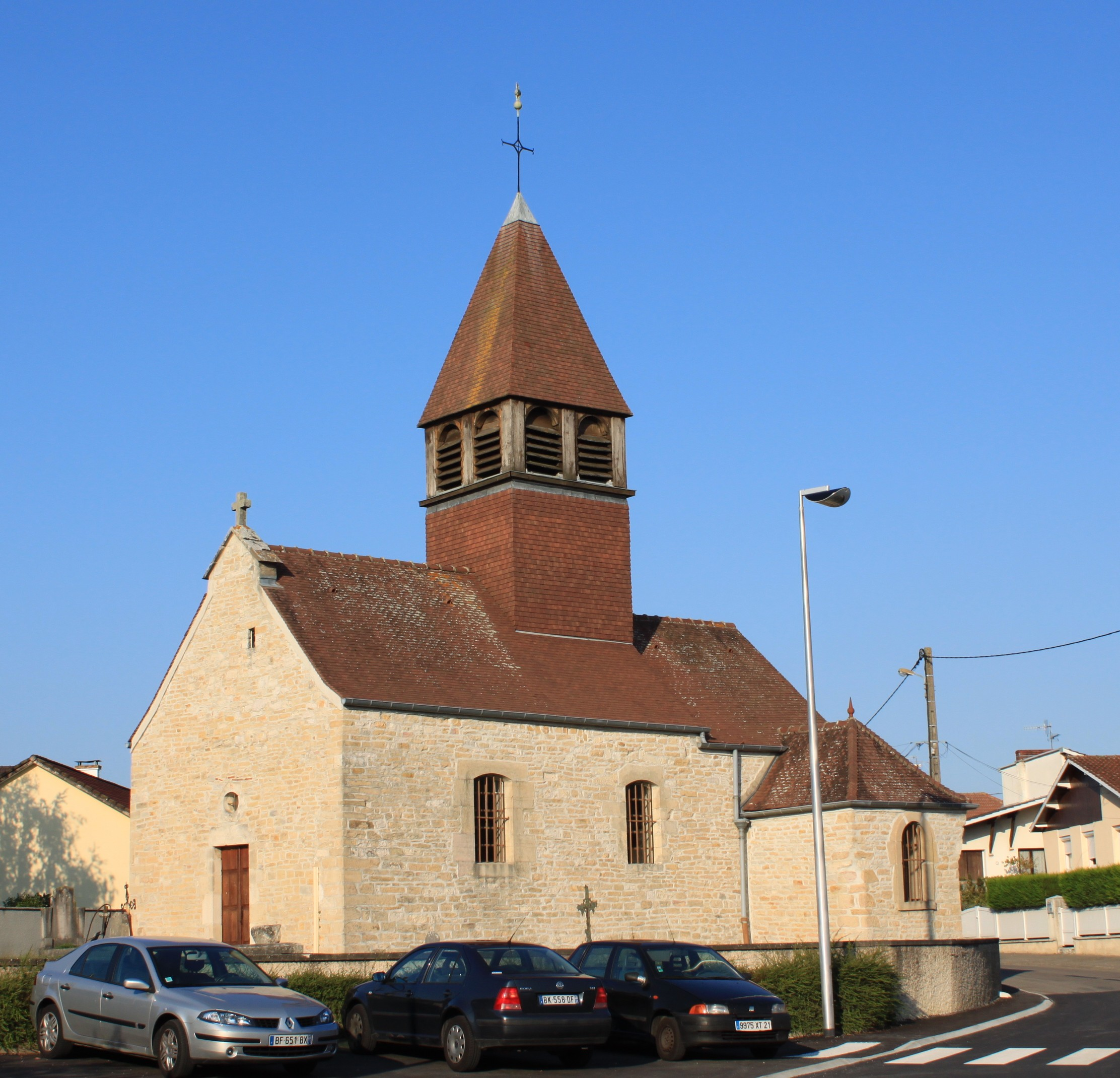 Crimolois, Côte d'Or, Bougogne, France